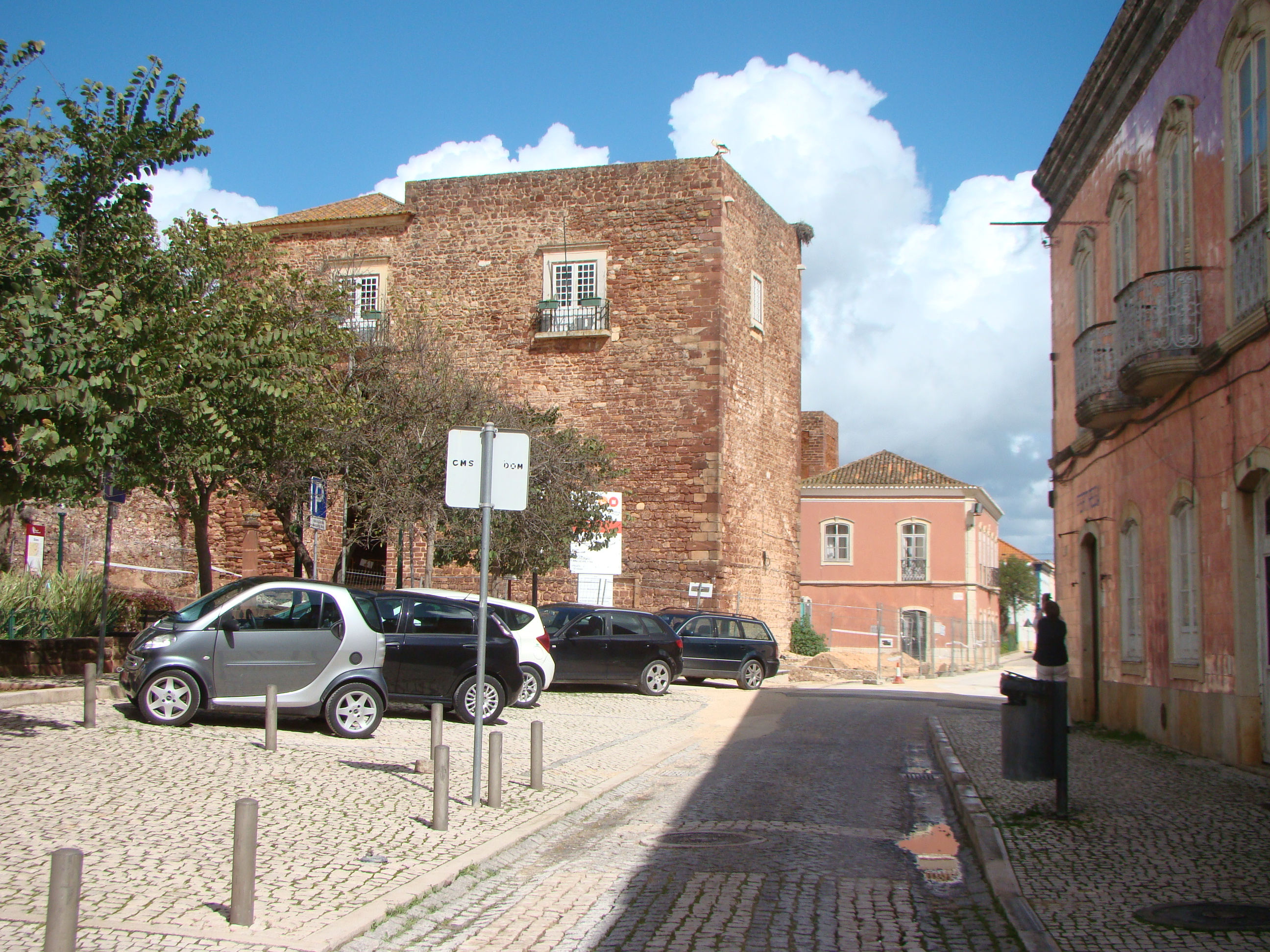 Silves - Rua Dr. Francisco Vieira 03/2018.